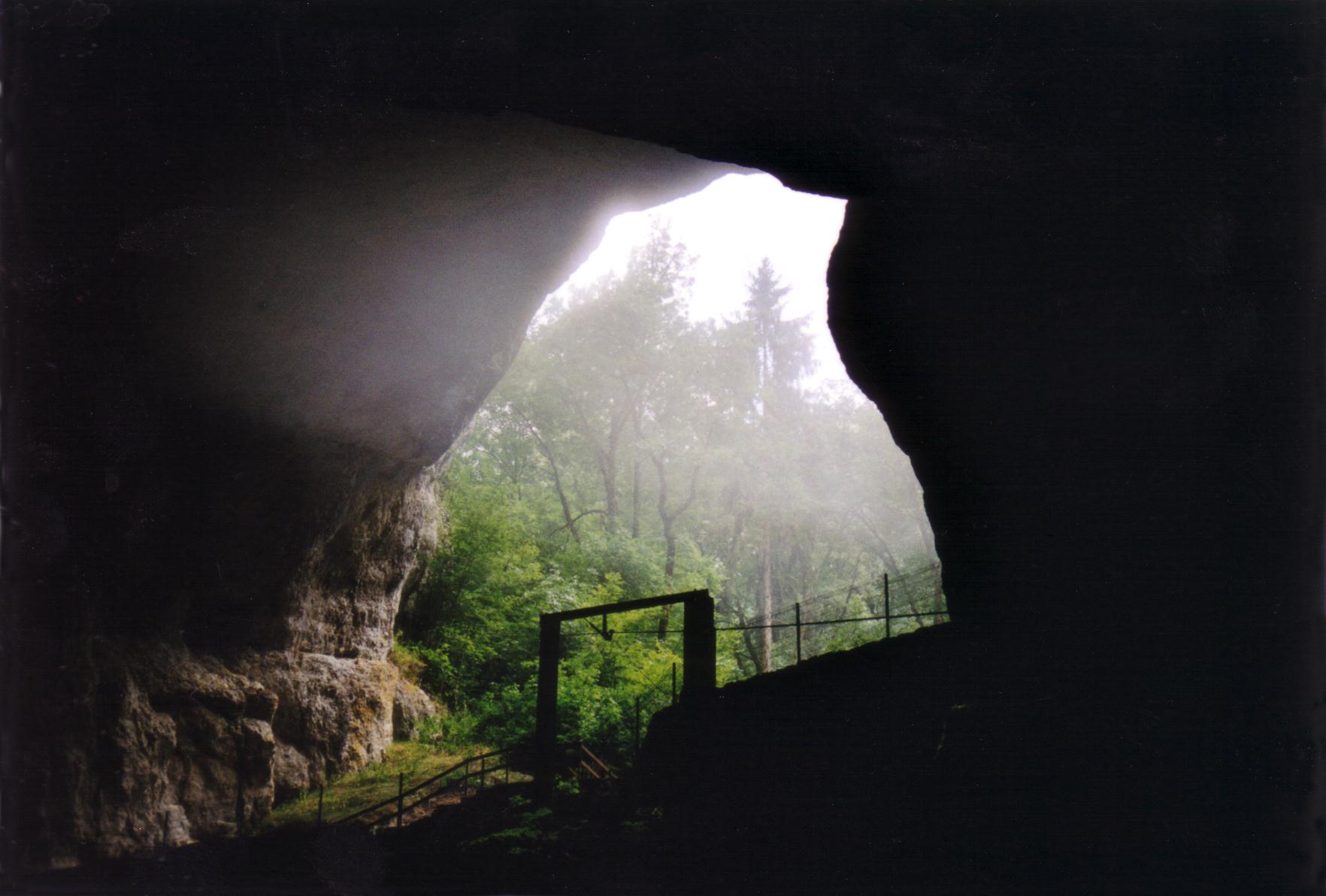 Grotte du Cerdon (Ain)